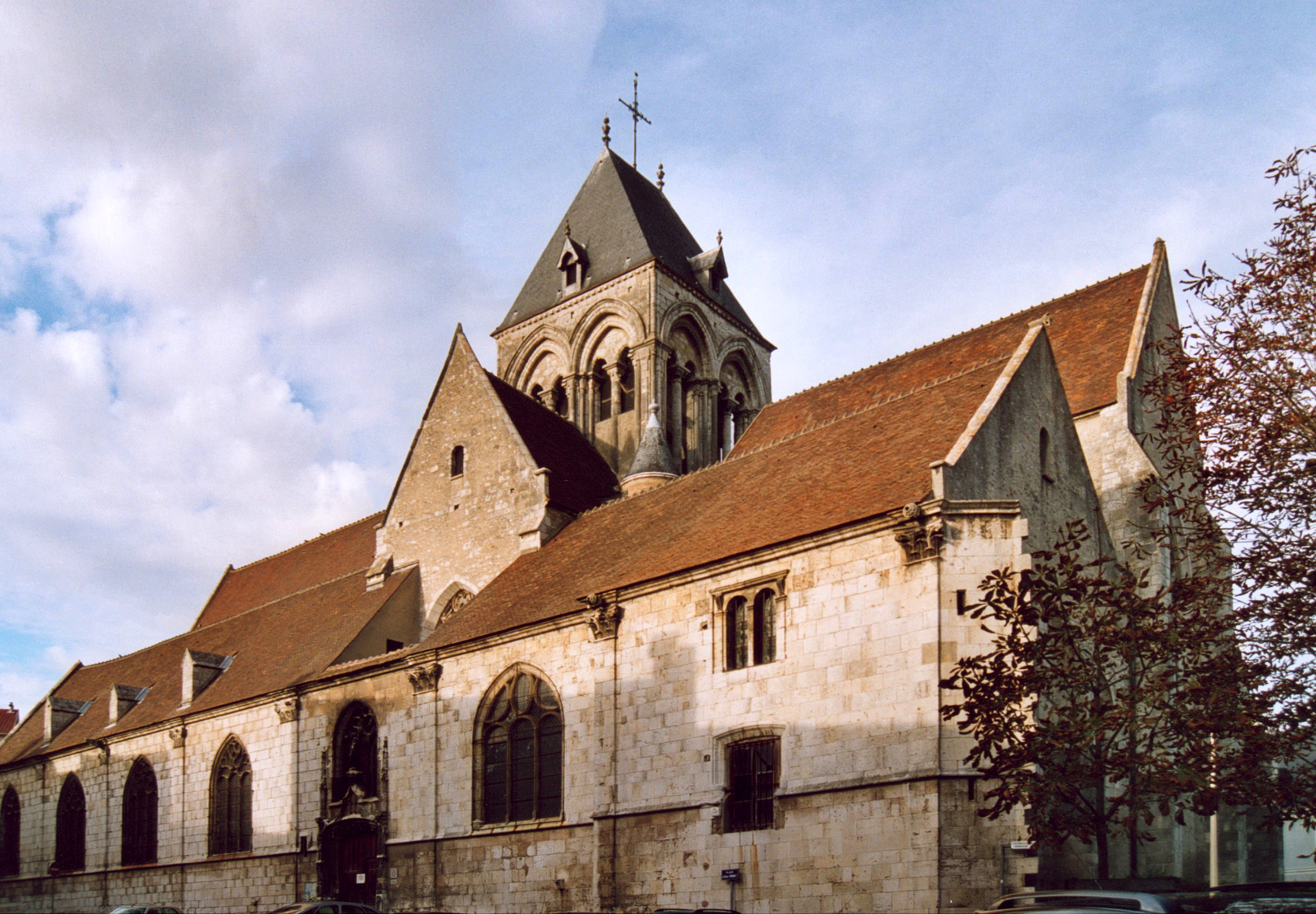 France Essonne Etampes Eglise Saint-Basile Photographie prise par GIRAUD Patrick